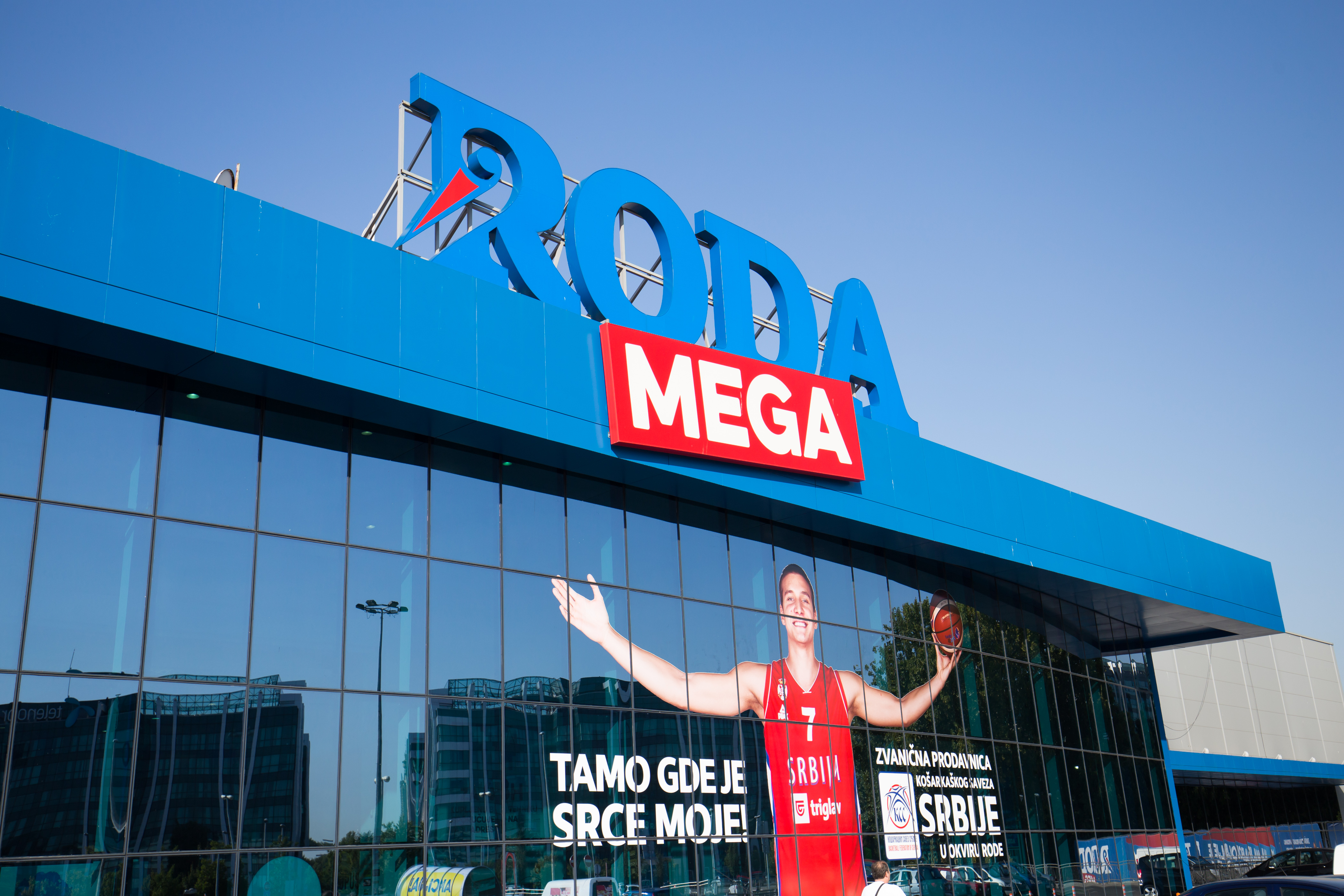 Moderno uređena Roda prodavnica na adresi Đorđa Stanojevića 35, Novi Beograd.